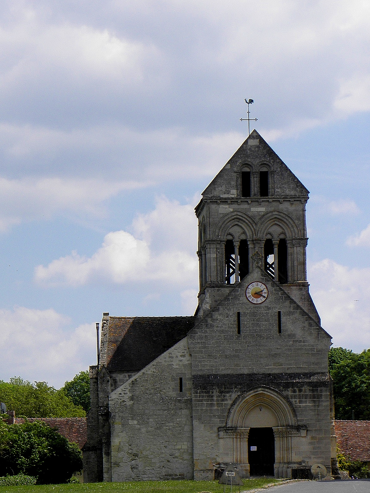 Église Saint-Bathélemy de Torcy-en-Valois (02).